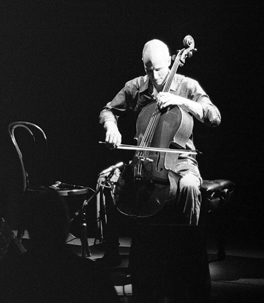 Erik Friedlander at Joe's Pub, 7/17/07.